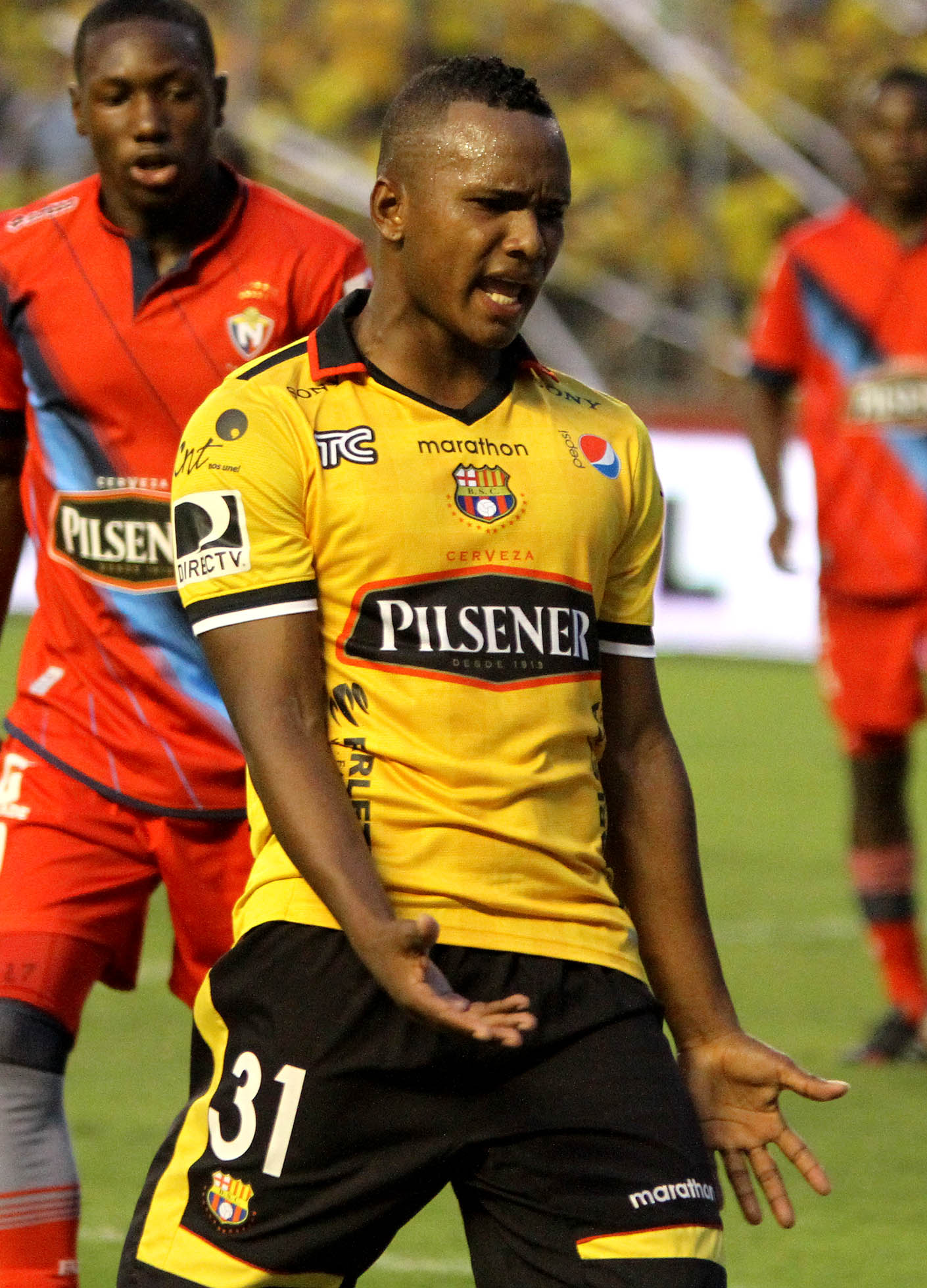 Guayaquil, 26 oct (Andes).- Encuentro entre Barcelona y El Nacional.